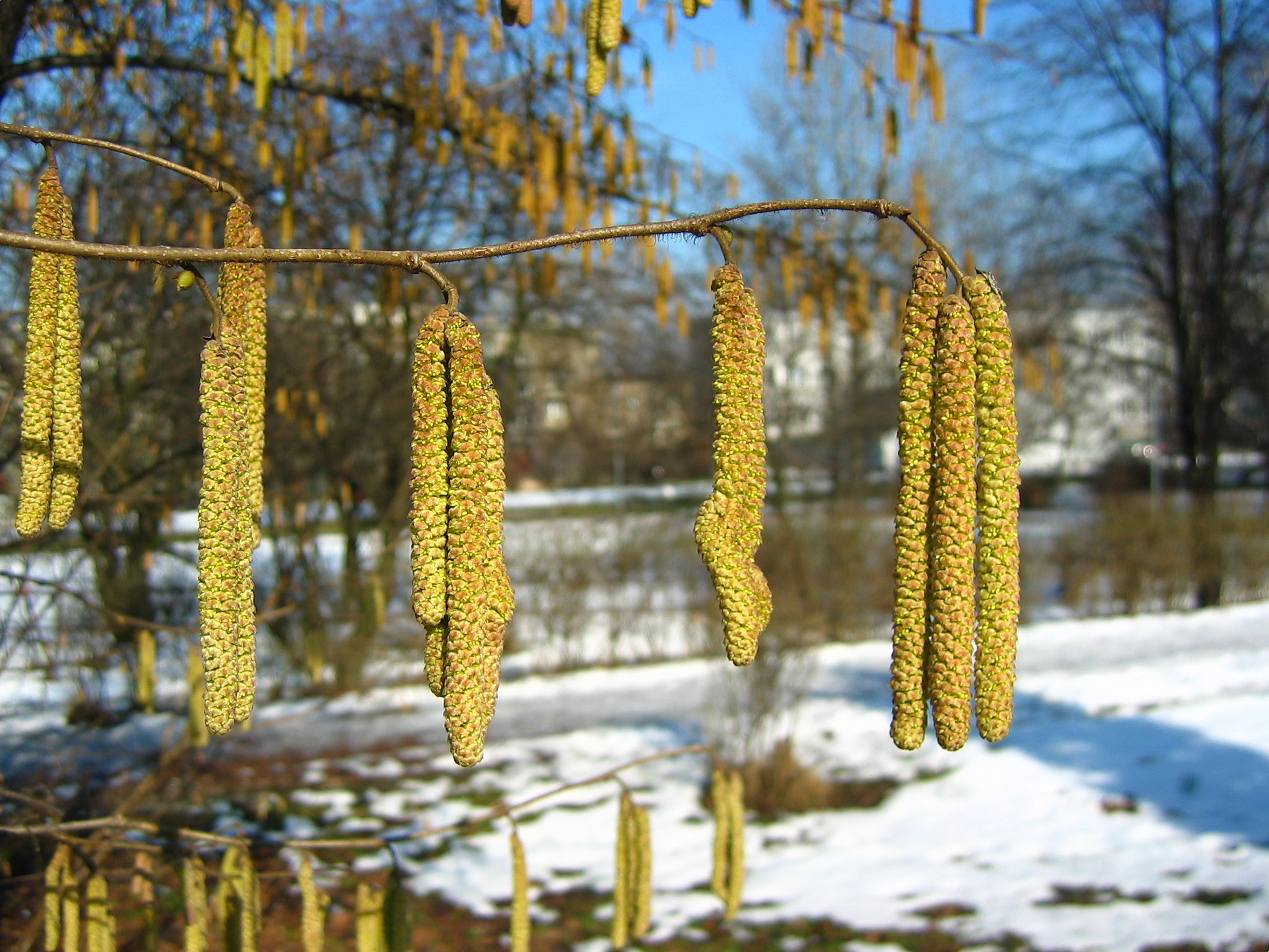 Leszczyna